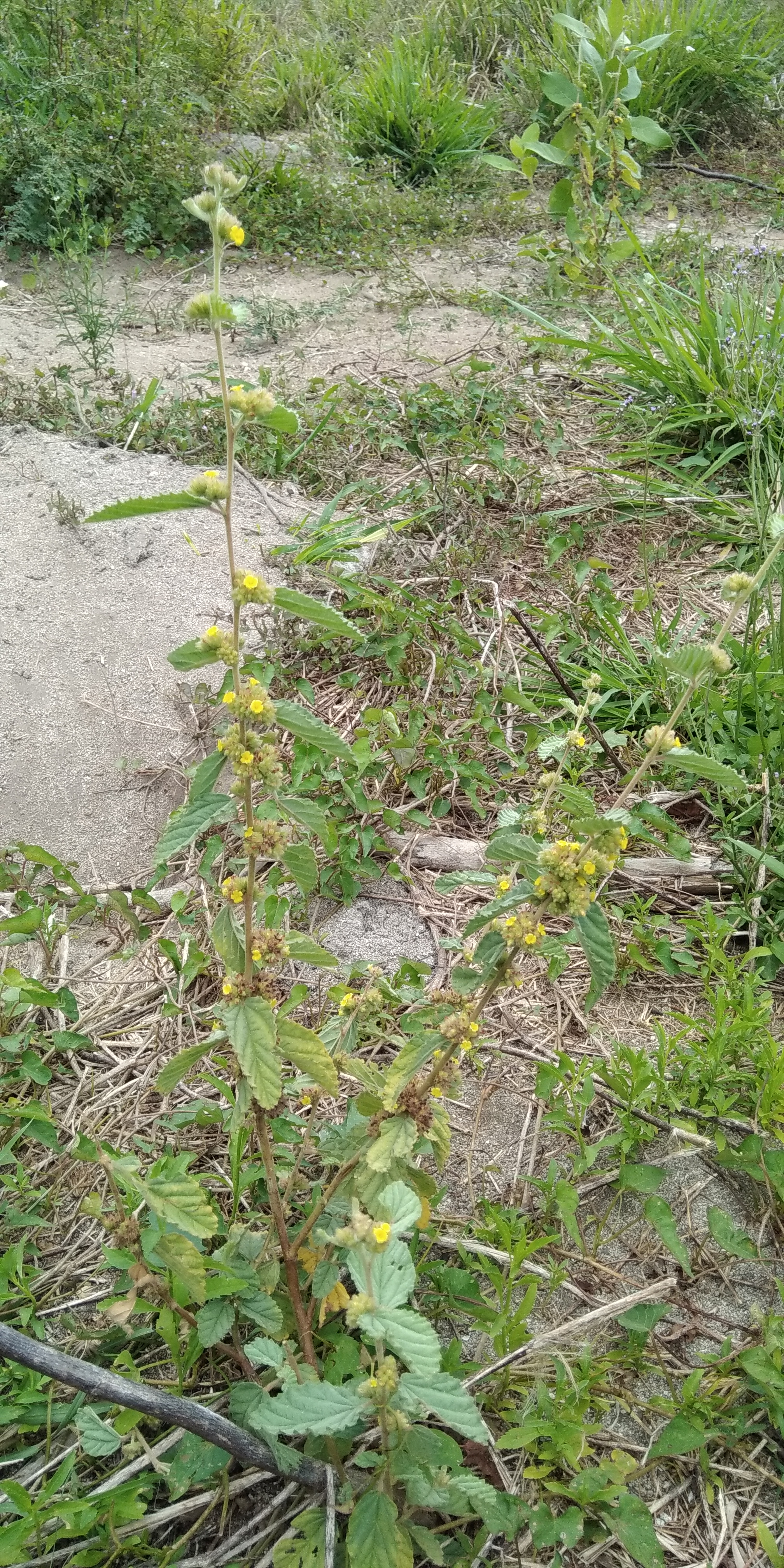 Waltheria indica à Cuba